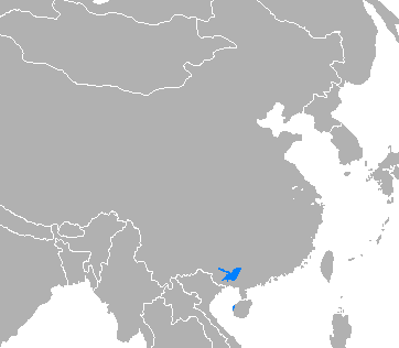 Idioma ping